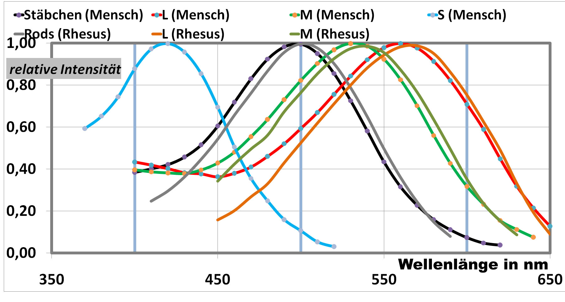 Die Grundvalenzen des Zapfenfarbraumes. Dargestellt in relativen Intensitätseinheiten für die L-, M- und S-Zapfen von Menschen sowie menschliche Stäbchen nach den mikrospektrometrischen Werten die Bowmaker und Mollon 1983 veröffentlichten und der L- und M-cons and rods für Rhesusaffen, die Bowmaker 1978 veröffentlicht hatte.